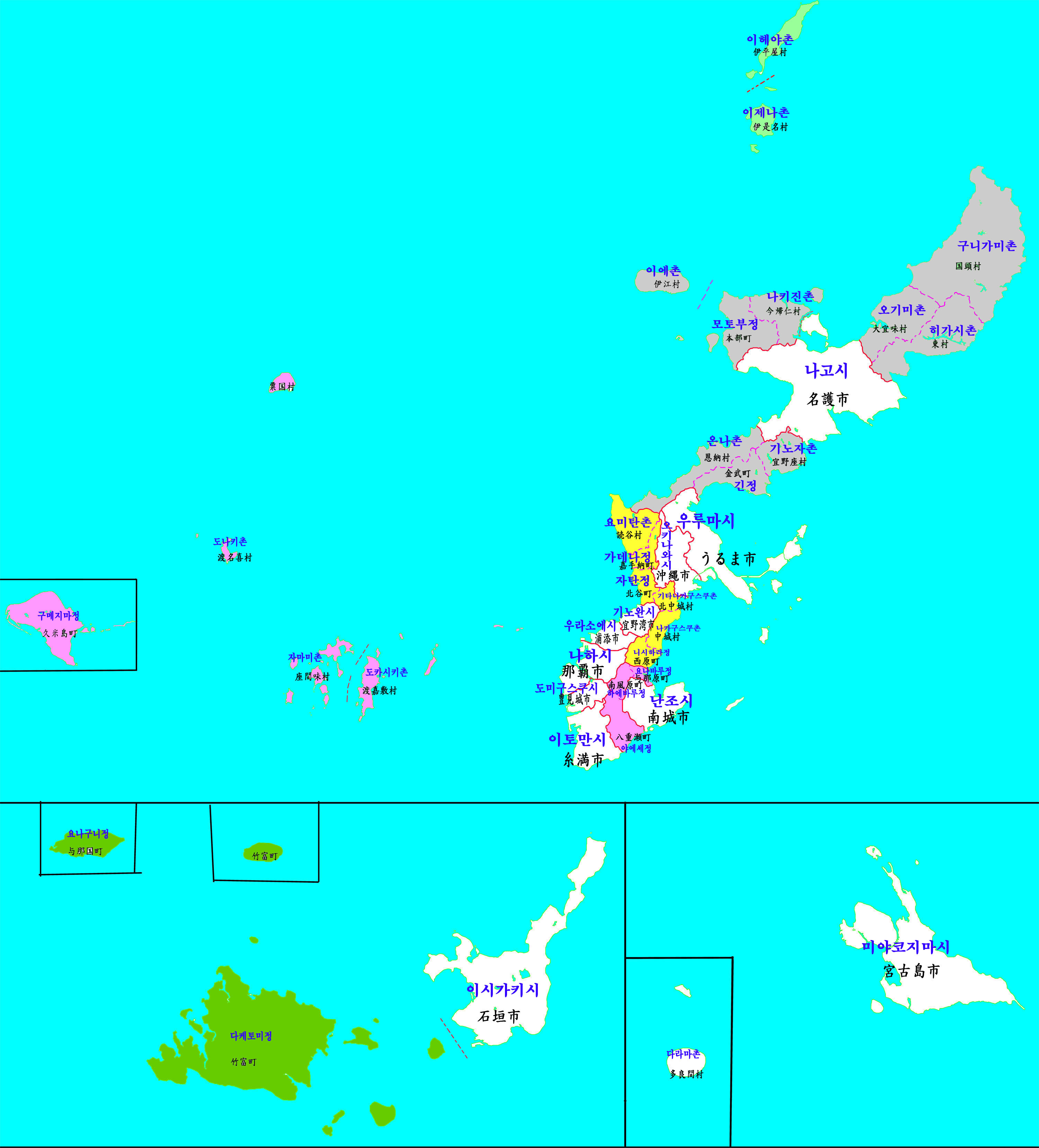 오키나와현 행정구역